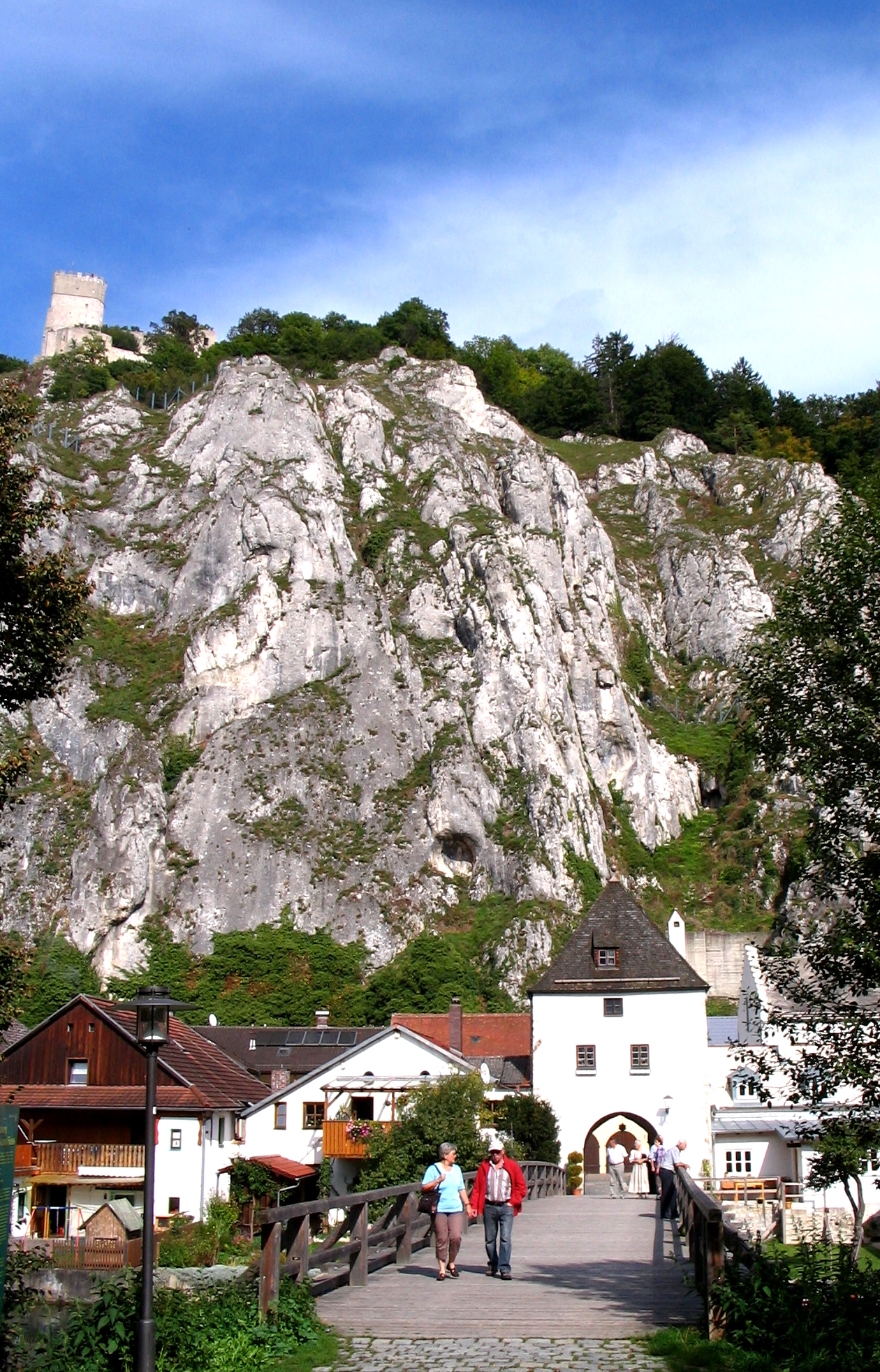 Markt Essing im Altmühltal, Landkreis Kelheim, Niederbayern: Markttor mit alter Atlmühlbrücke und Burgruine Randeck